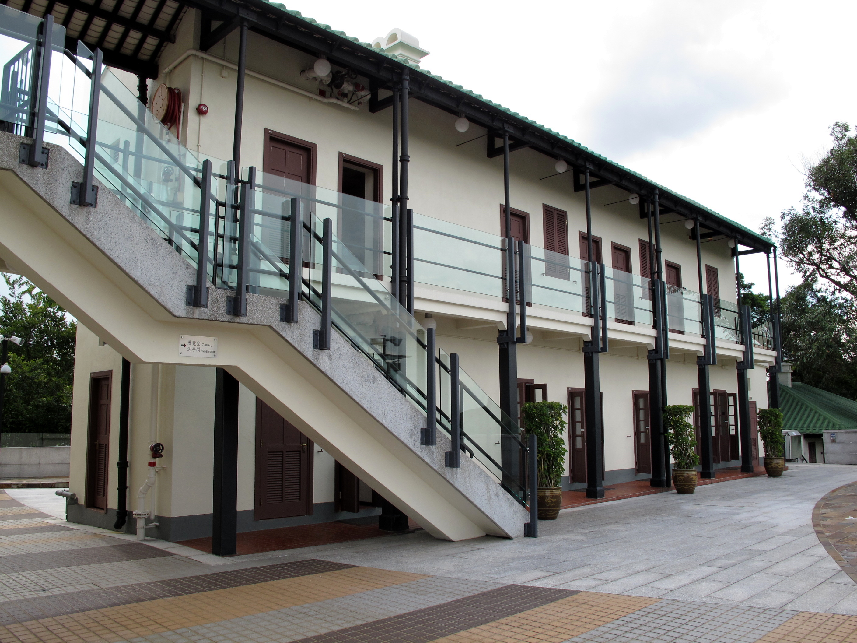 Ping Shan Tang Clan Gallery 屏山鄧族文物館